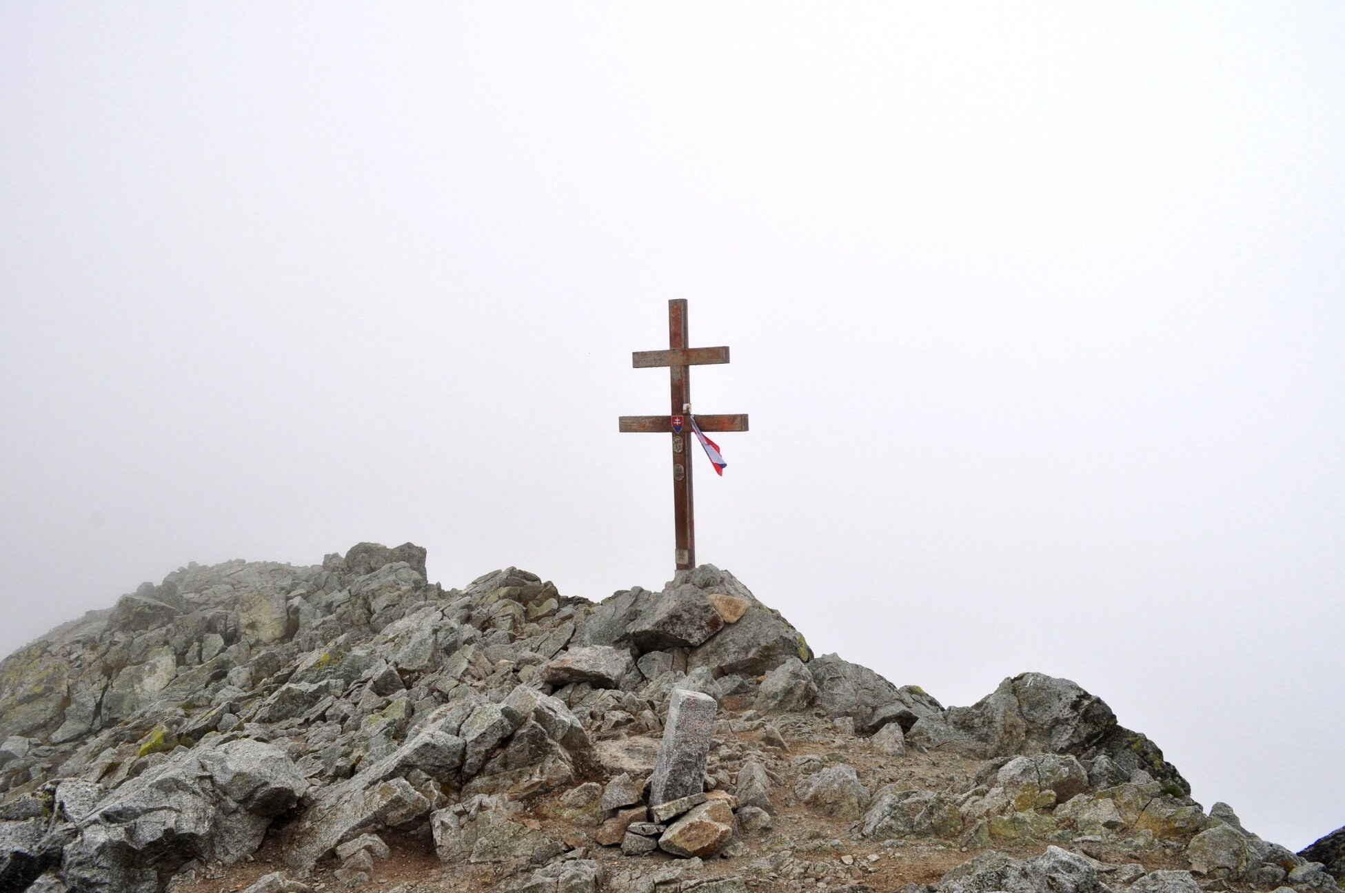 Vrcholový kríž na Kriváni